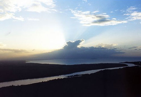 Foto aérea de atardecer en Río San Juan, Nicaragua.